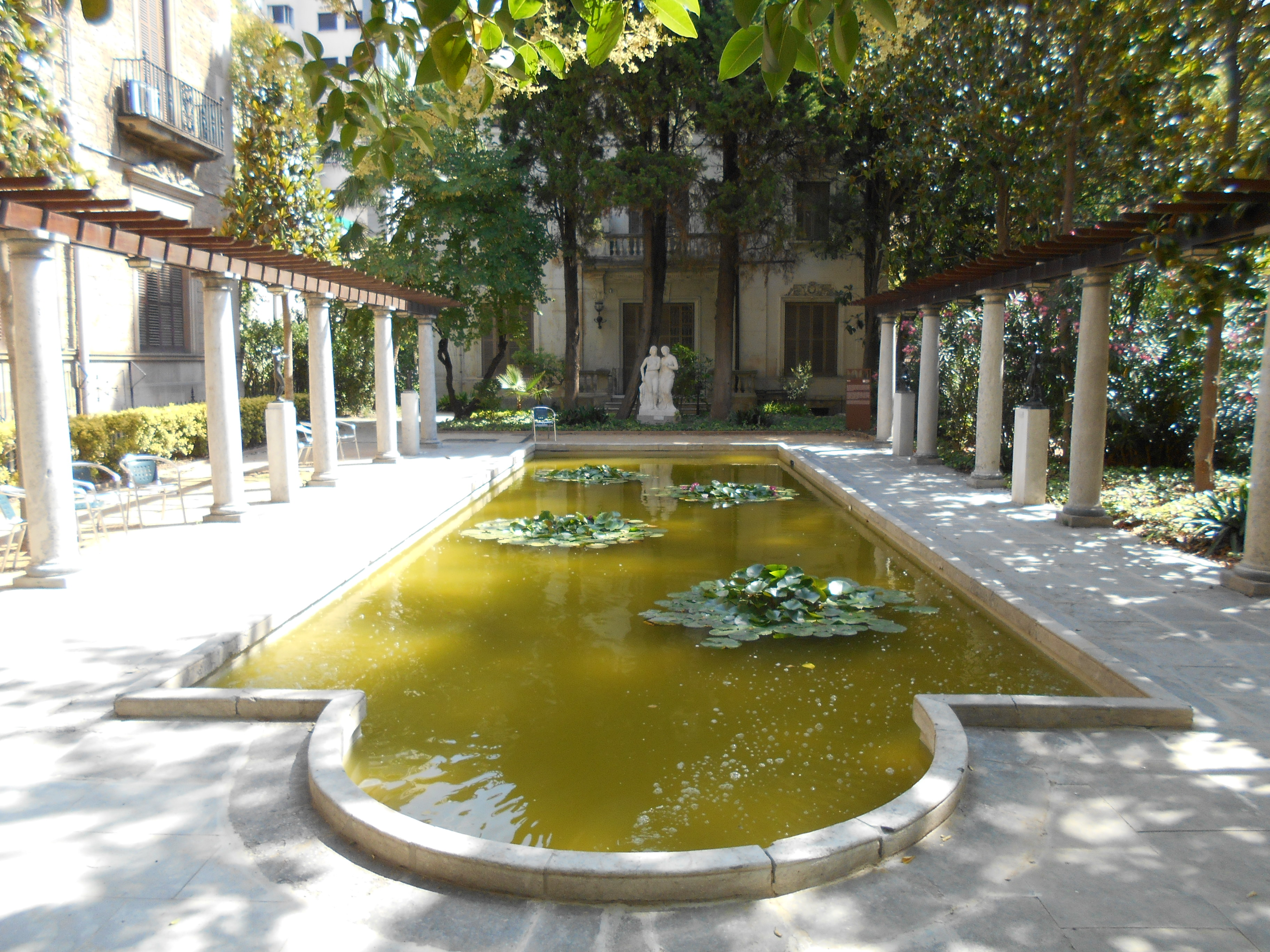 Jardín de la Fundación Julio Muñoz Ramonet, estanque superior.